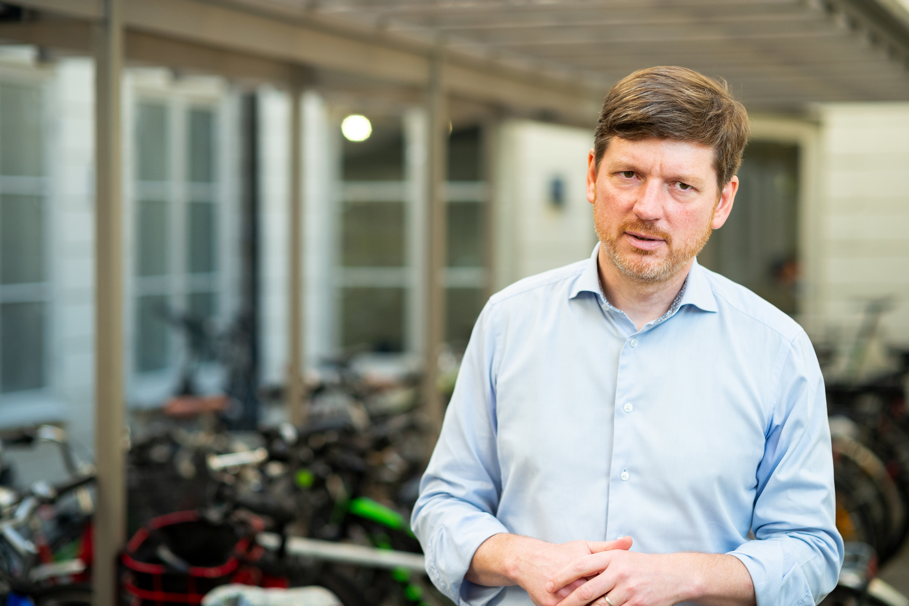 Martin Ådahl, Centerpartiet Martin Ådahl, Riksdagsledamot för Centerpartiet.